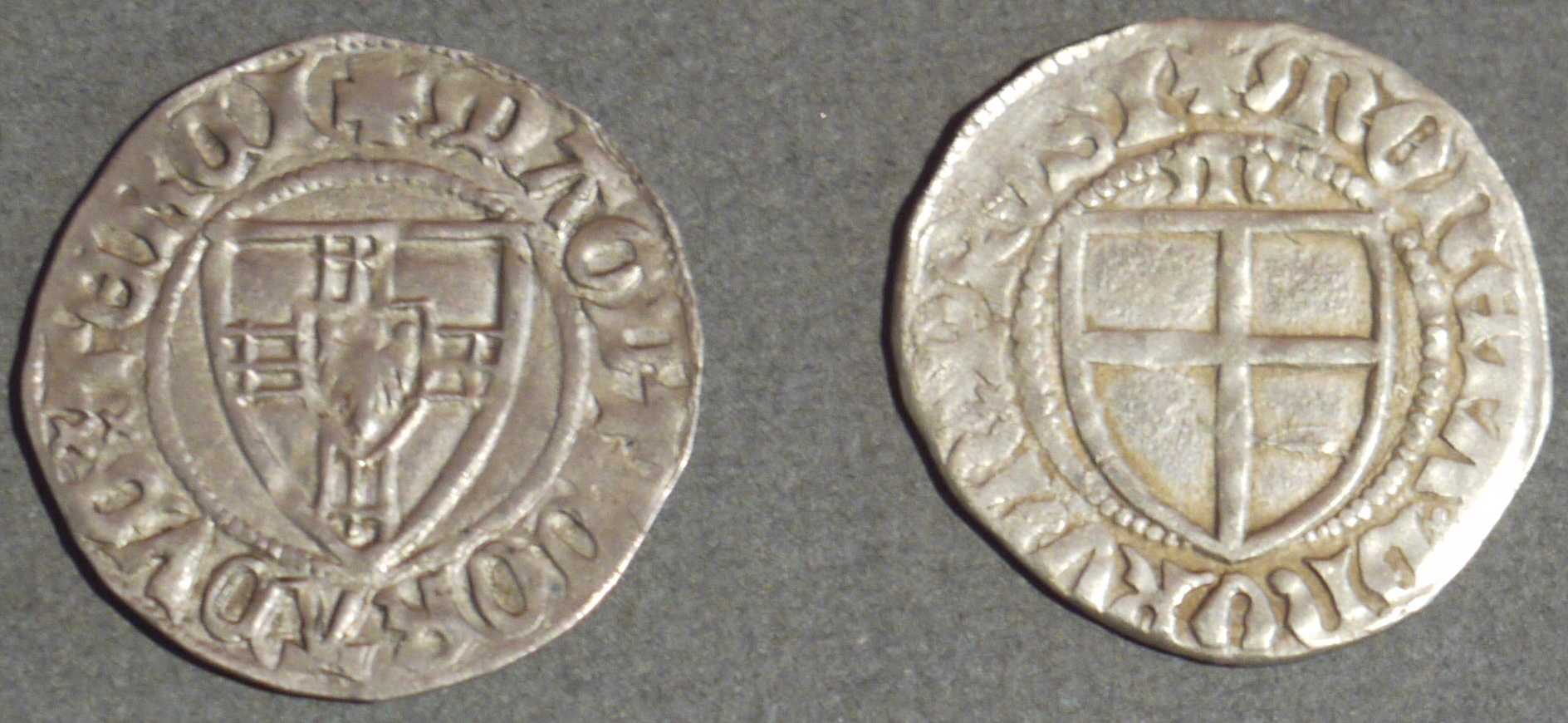 Szelągi z czasów Konrada V von Jungingena ze zbiorów gabinetu numizmatycznego w Malborku.